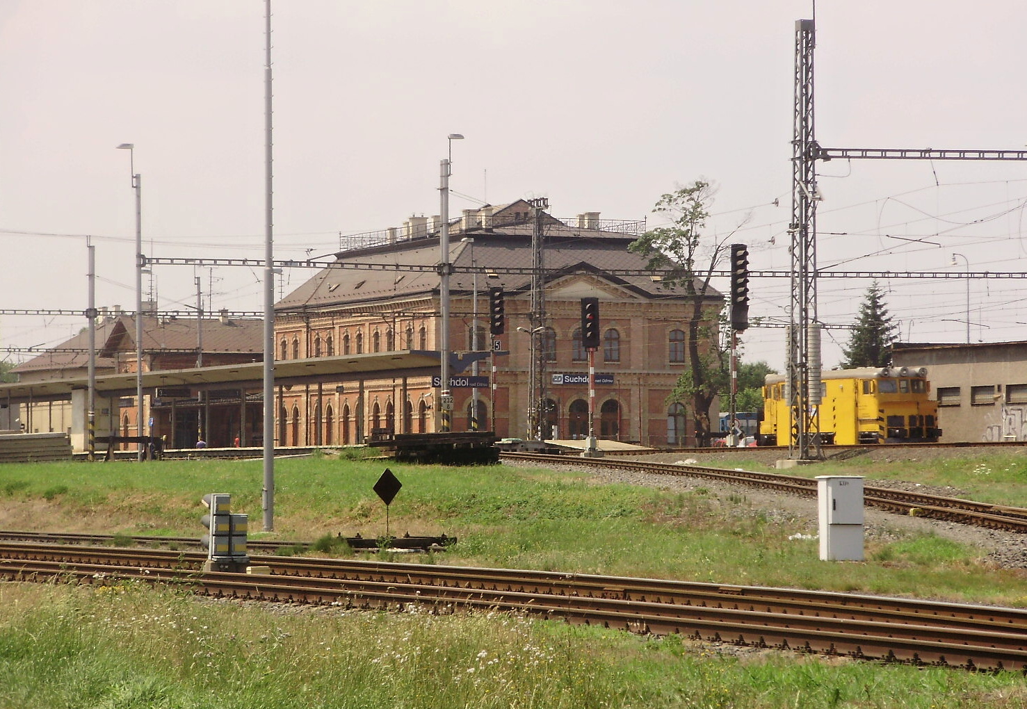 Vlakové nádraží Suchdol nad Odrou